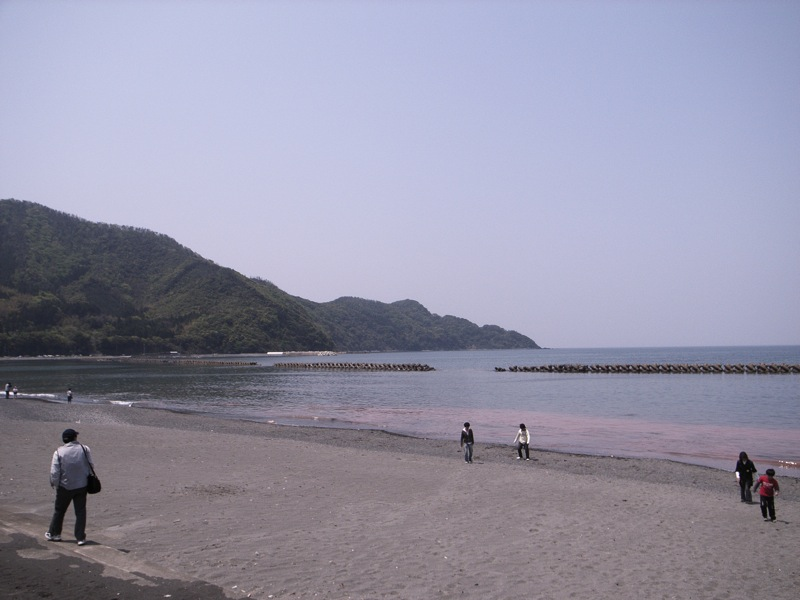 A beach of Wakasa Bay, Fukui, Japan.